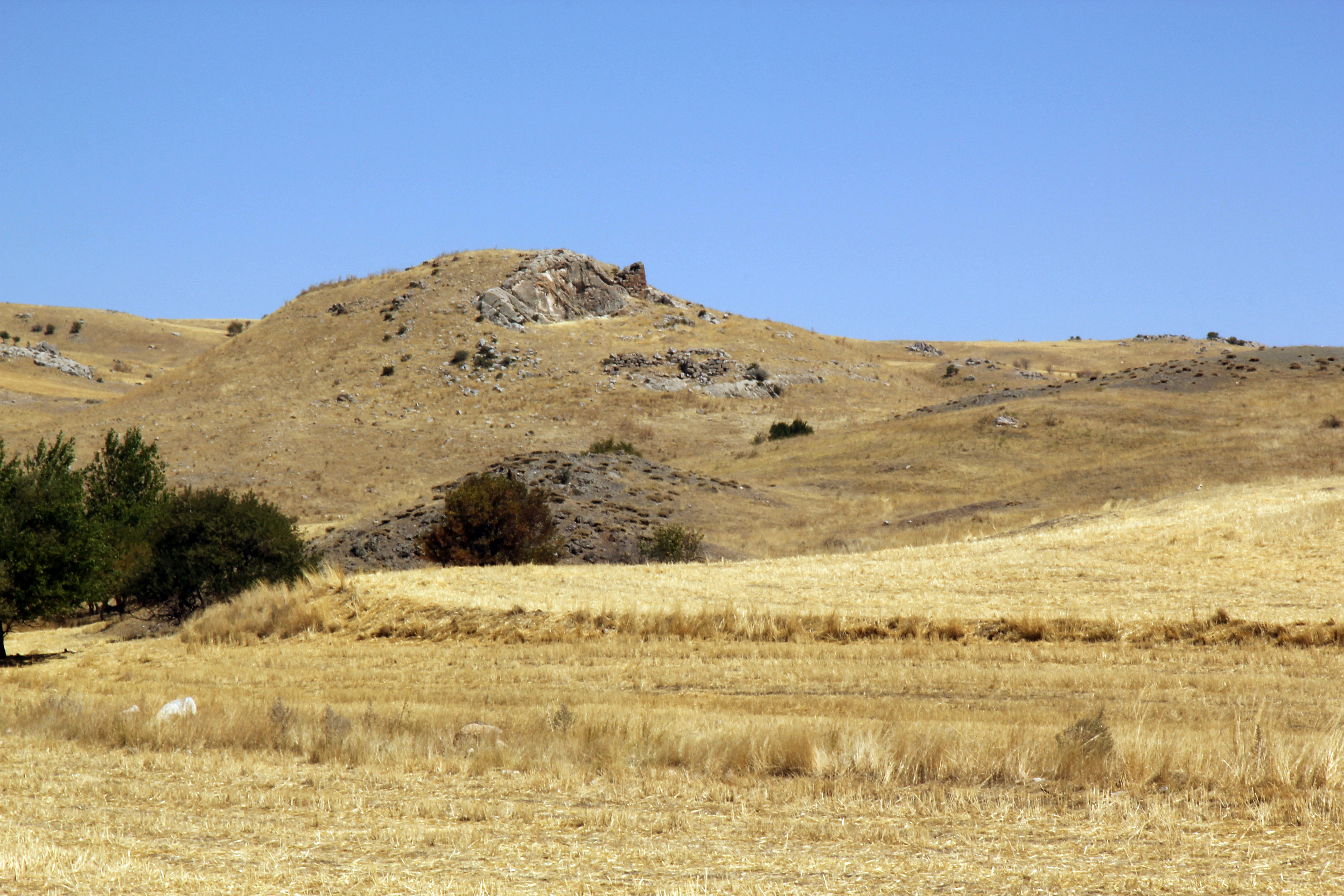 Gavurkale, hethitisches Felsrelief bei Haymana, Zentraltürkei, südlich von Ankara